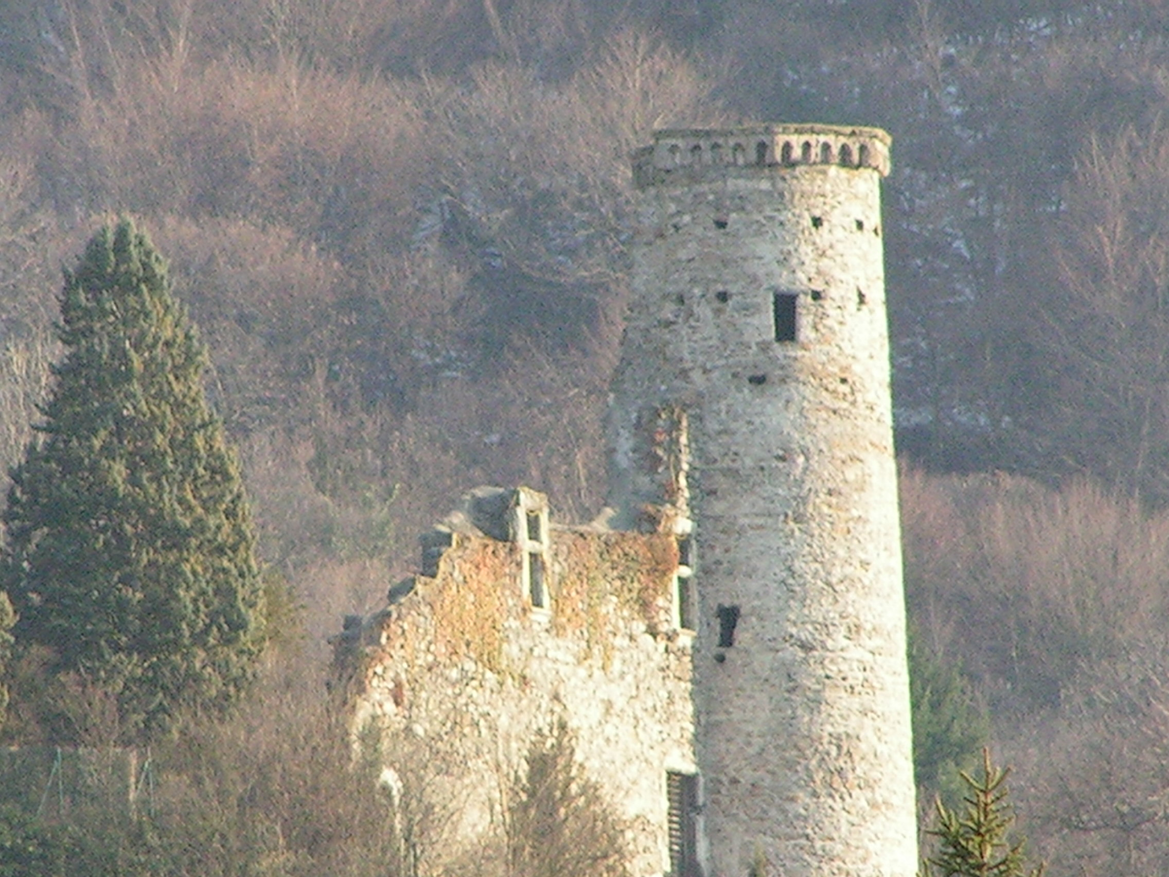 Voici la Tour de Champ sur Drac.